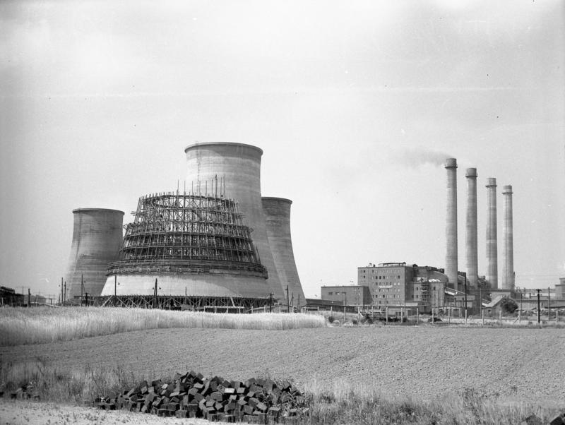 Berzdorf, Kraftwerk Berzdorf Zentralbild / Kahl 26.6.59. Vom Bau des Kraftwerkes Berzdorf. Zur Zeit sind die Arbeiter des VEB Spezialbau Leipzig dabei, den vierten Kühlturm im Kraftwerk Berzdorf zu errichten. Der Kühlturm wird eine Wassermenge von 15.000m³ pro Stunde um 10° Celsius herunterkühlen. Die Arbeiter vom VEB Energiebau Radebeul verlegen jetzt die 220-KV-Hochspannungsleitung von Trattendorf nach Berzdorf. UBz: (Links) die Kühltürme des Kraftwerkes.